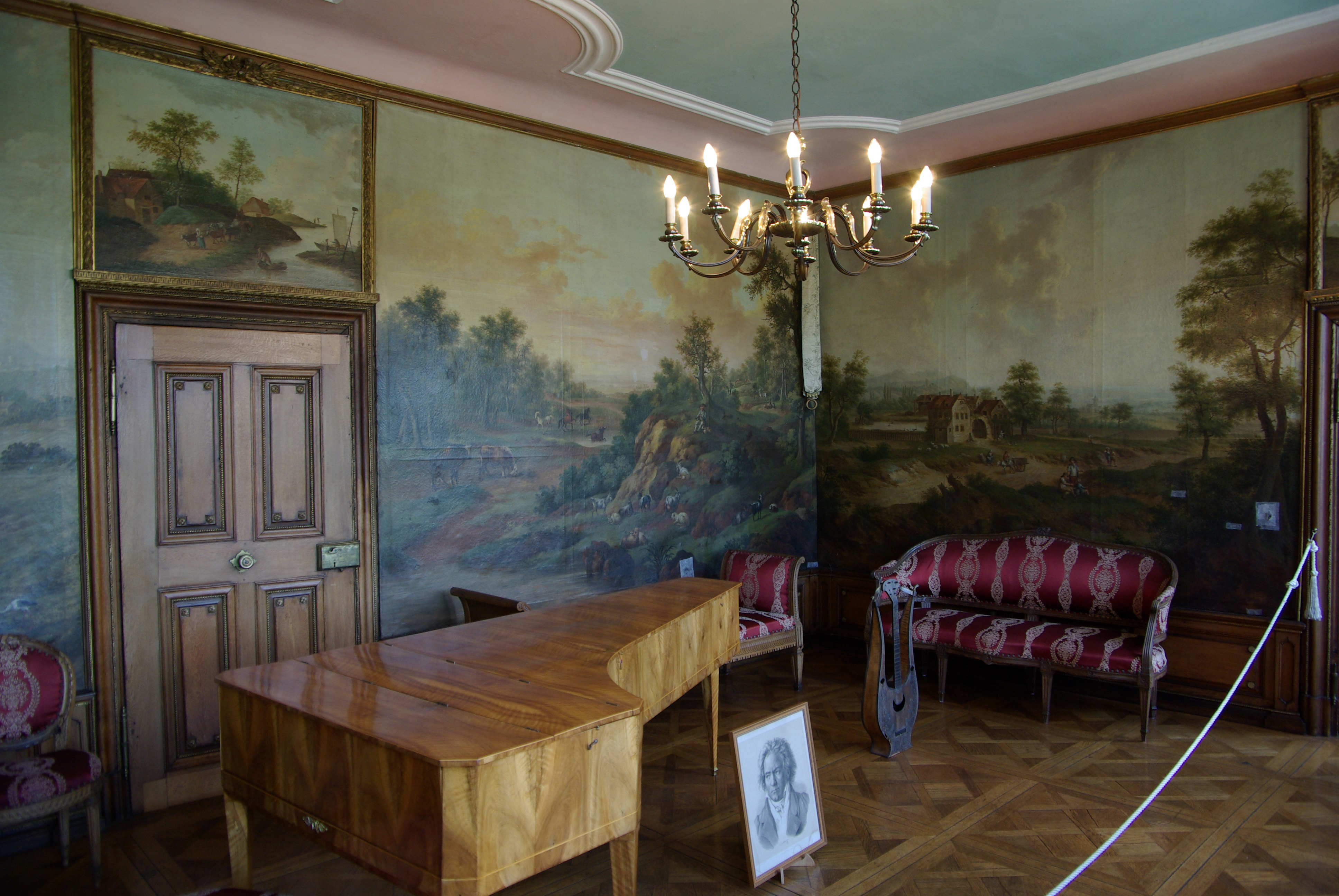 Traben-Trarbach, Mittelmosel-Museum in der Barockvilla Böcking, Raum 8 im ersten Obergeschoss